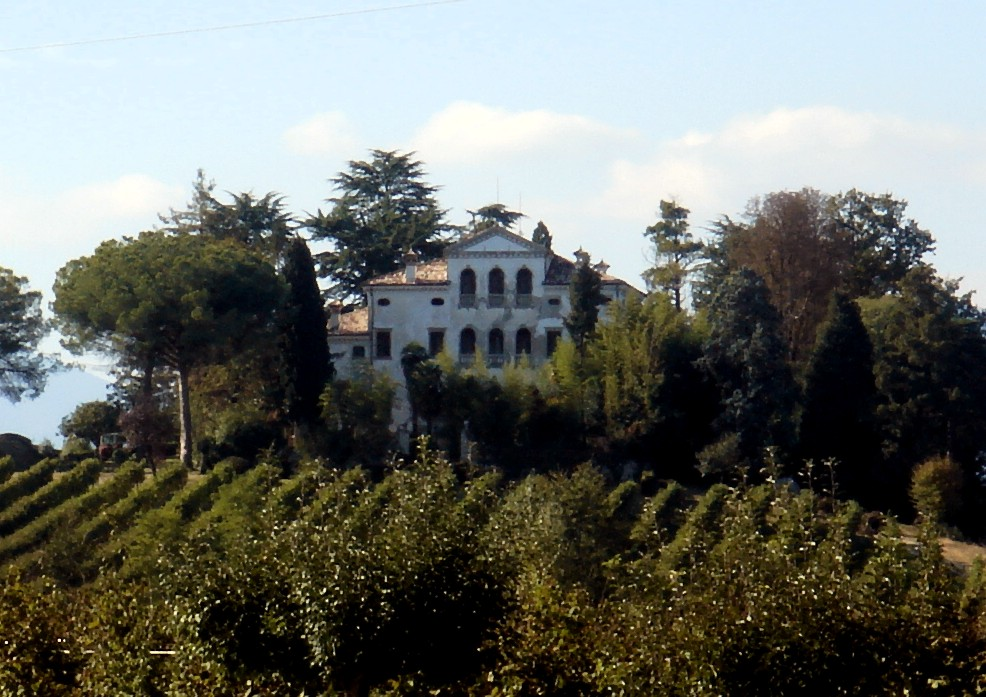 Ogliano di Conegliano (Treviso): Villa Maresio detta Palazzo delle Anime (XVII sec.), in località Calpena.